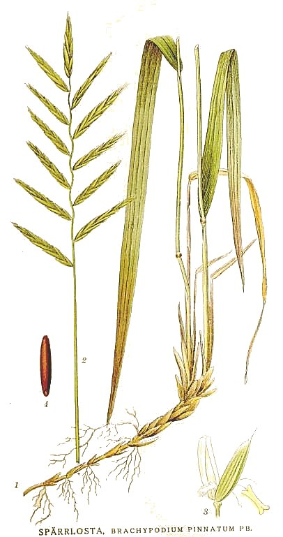 Brachypodium pinnatum (L.) P. Beauv. Original Description "Spärrlosta", Brachypodium pinnatum Pb.